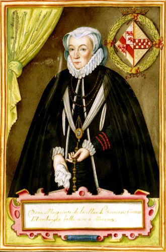 Zeitgenössisches Porträt von Margaretha von Arenberg (1527-1599)